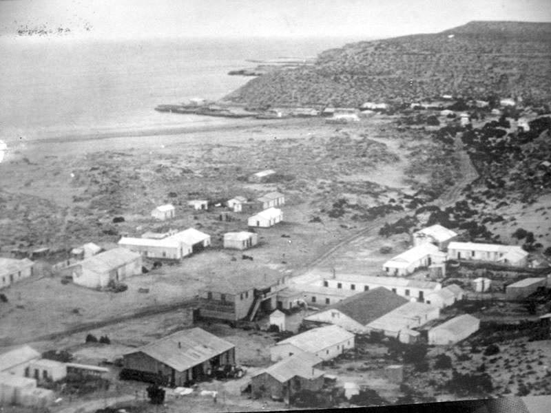 Puerto Pirámides, Chubut ca. 1920